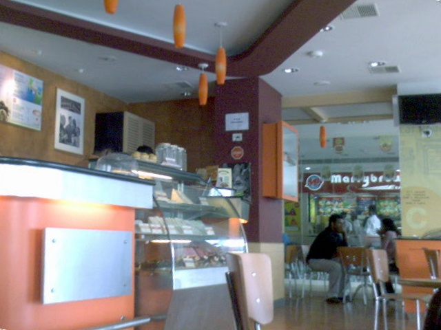 I made it mayself